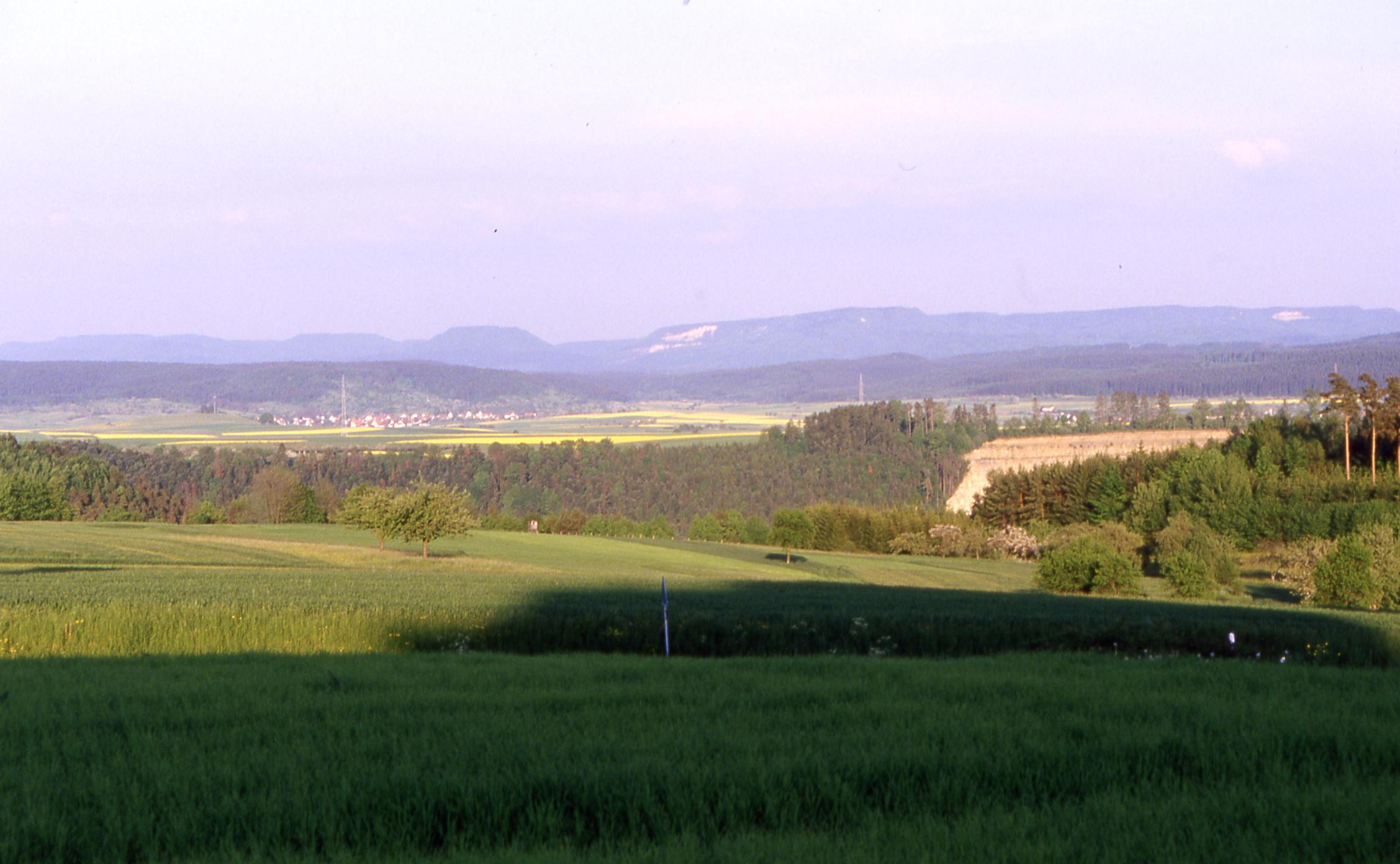 Gäulandschaft und Albtrauf vom Hochmark bei Frommenhausen aus gesehen. Im Vordergrund mit Elbenloch, Mittelgrund mit Rammert und Dettingen, Hintergrund Albtrauf mit Mössinger Bergrutsch.